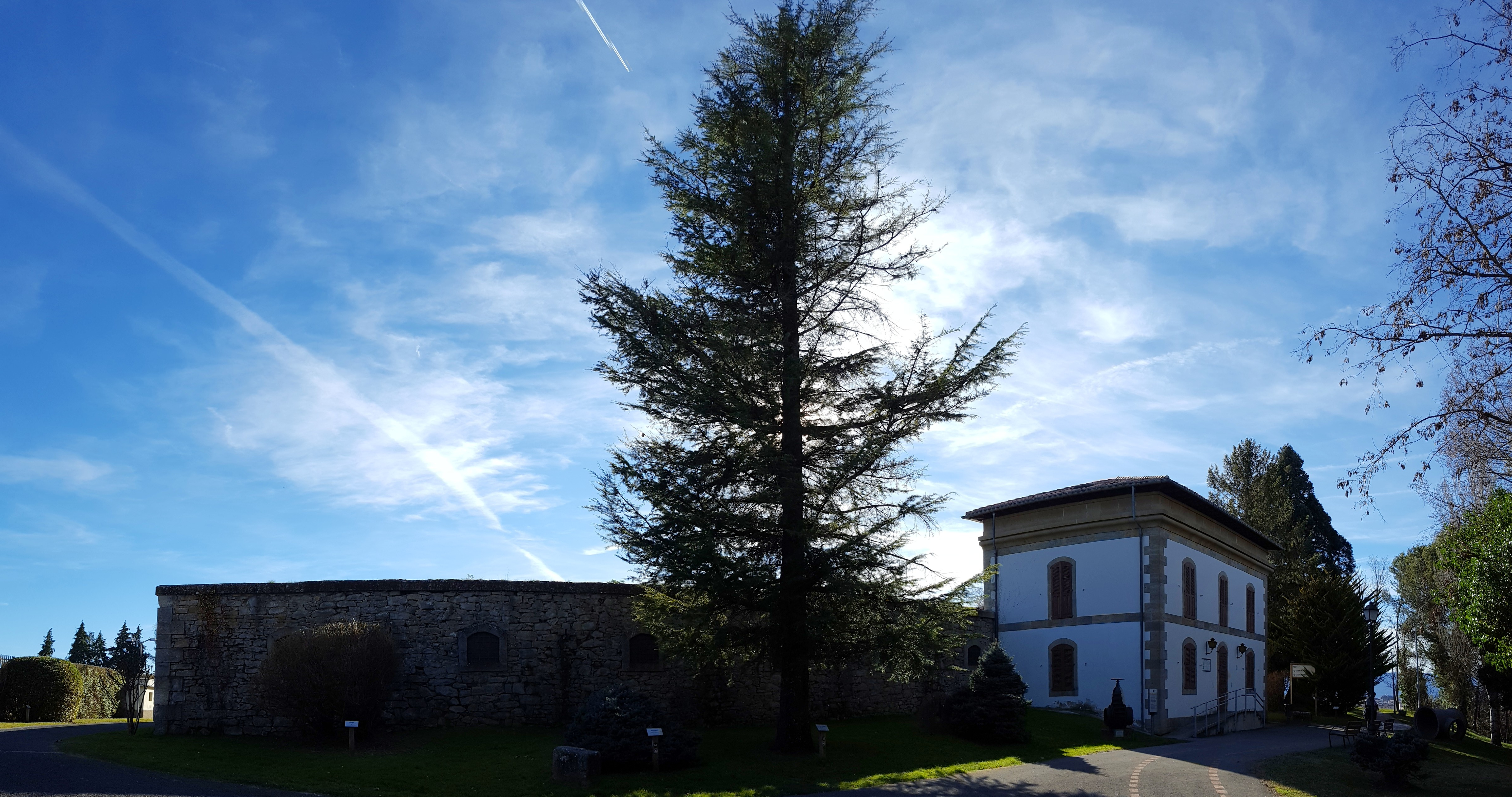 Iruñeako ur-biltegi zaharra